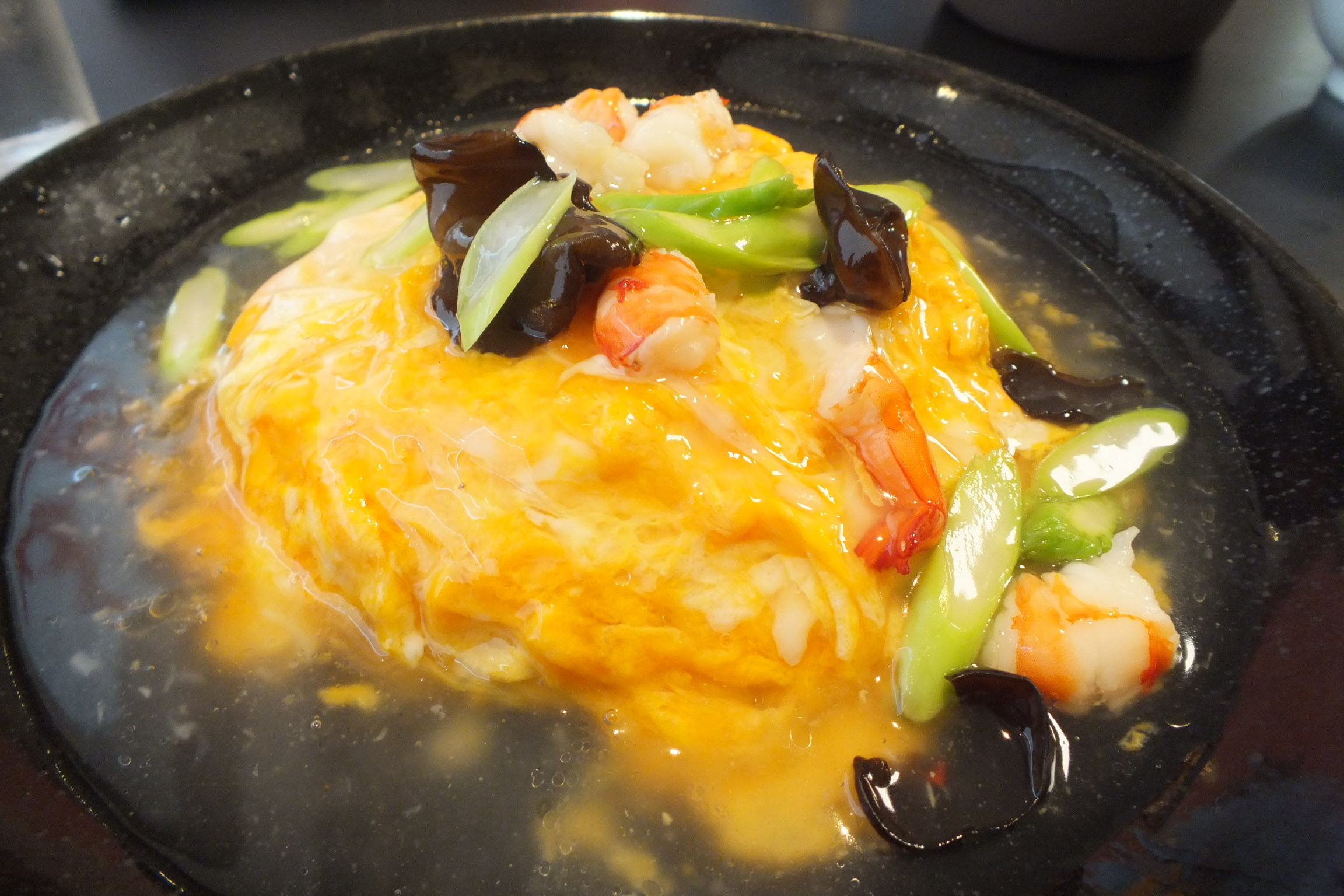 Ohshou,Gokuoh Tenshin-han 王将・極王天津飯 630円